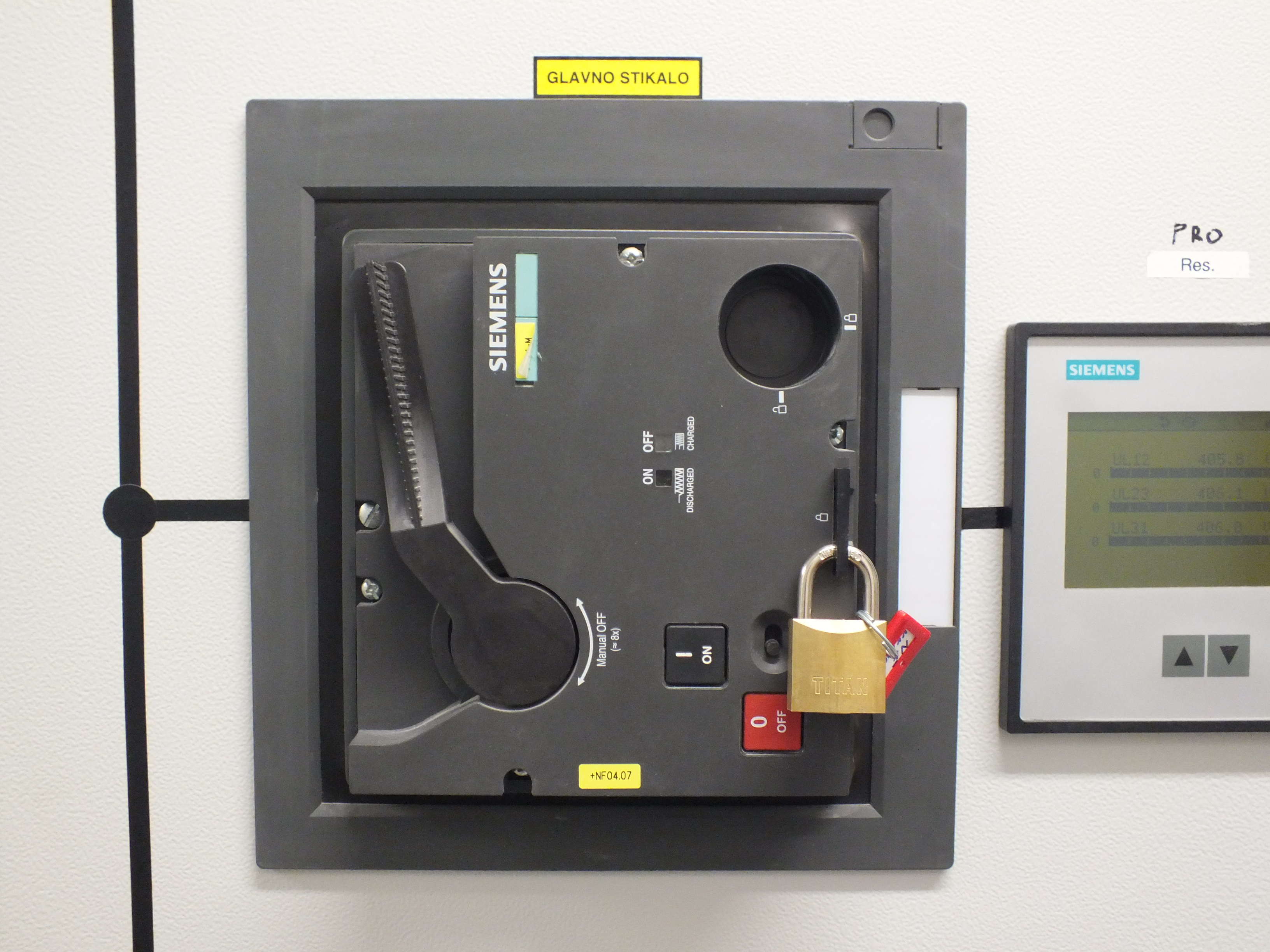 Glavno stikalo, zavarovano pred neželenim vklopom s ključavnico in označeno z oznako "NE VKLAPLJAJ".